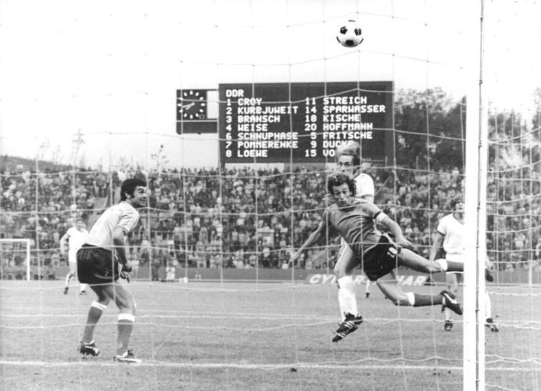 ADN-ZB-Mittelstädt-4.7.74-Gelsenkirchen (BRD): X. Fußball-Weltmeisterschaft-2. Finalrunde, Gruppe A: DDR gegen Argentinien 1:1 am 3.7.74- DDR-Stürmer Joachim Streich (Bildmitte) erzielt hier nach einer Flanke von Konrad Woise in der 14. Minute mit Kopfball das 1:0-Führungstor. Davor Enrique Ernesto Wolff. Links Angel Hugo Bargas (beide Argentinien). Rechts Martin Hoffmann (DDR).